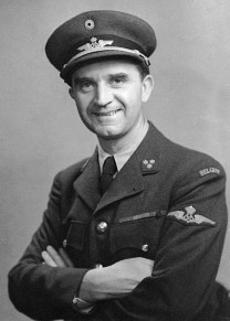 Militaire s'étant illustré durant la WWII, fondateur du réseau possum, il se suicide en 1944.